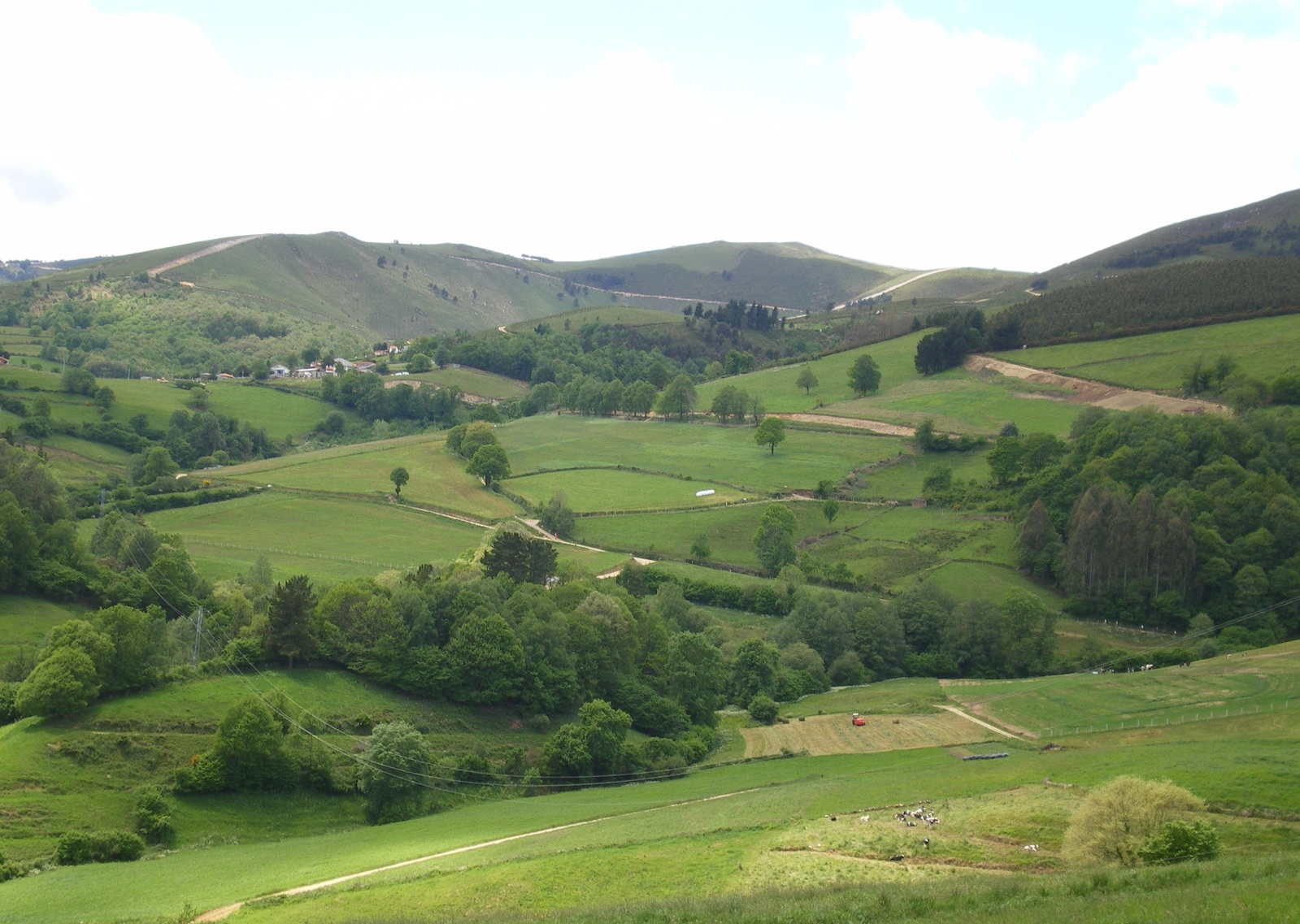 Vista de Porciles